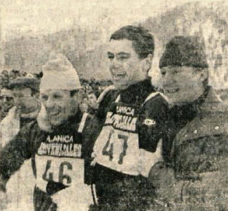 Manfred Wolf (#47).